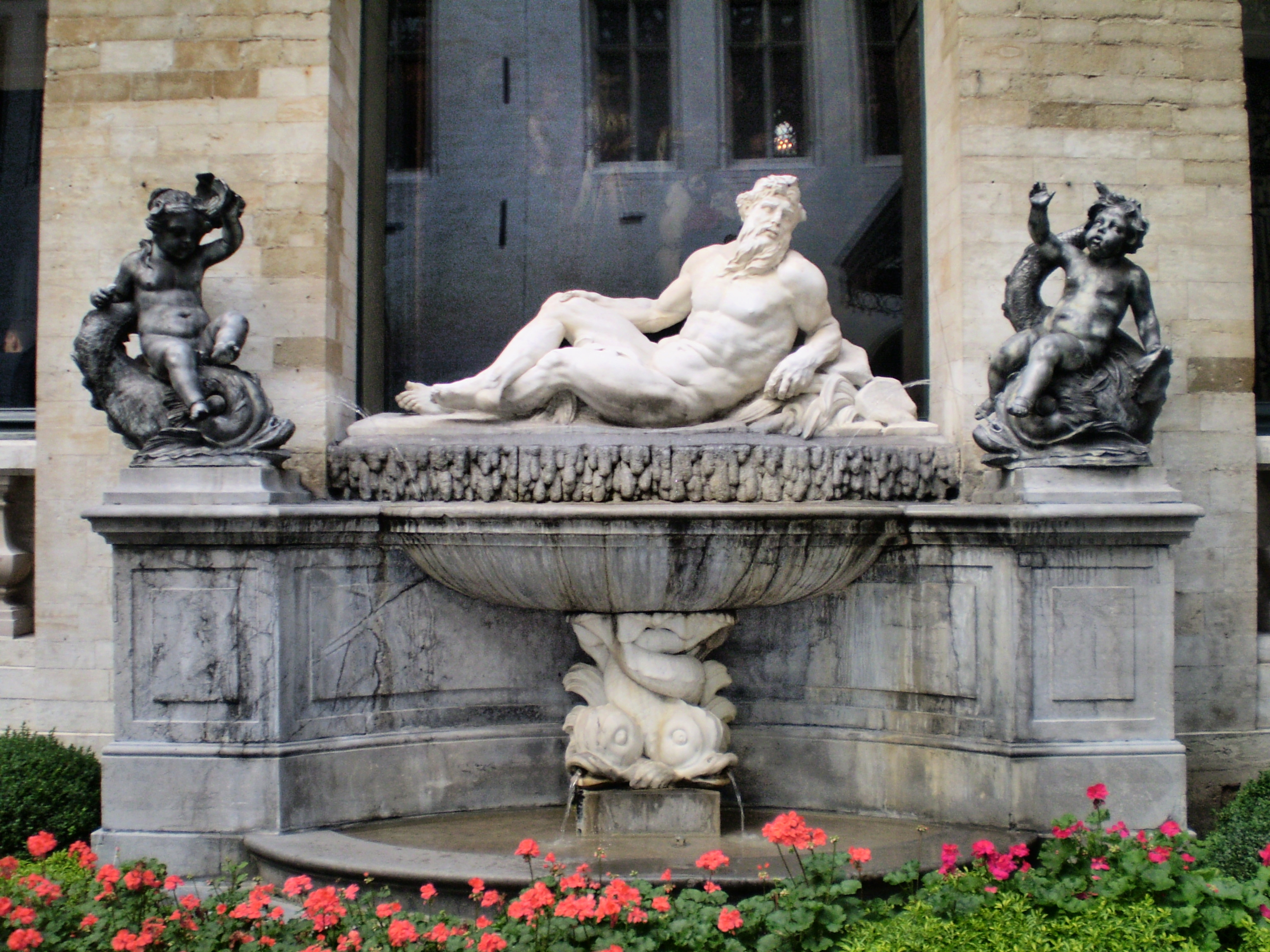 Hôtel de Ville de Bruxelles, cour centrale: L'Escaut par Pierre-Denis Plumier, 1715